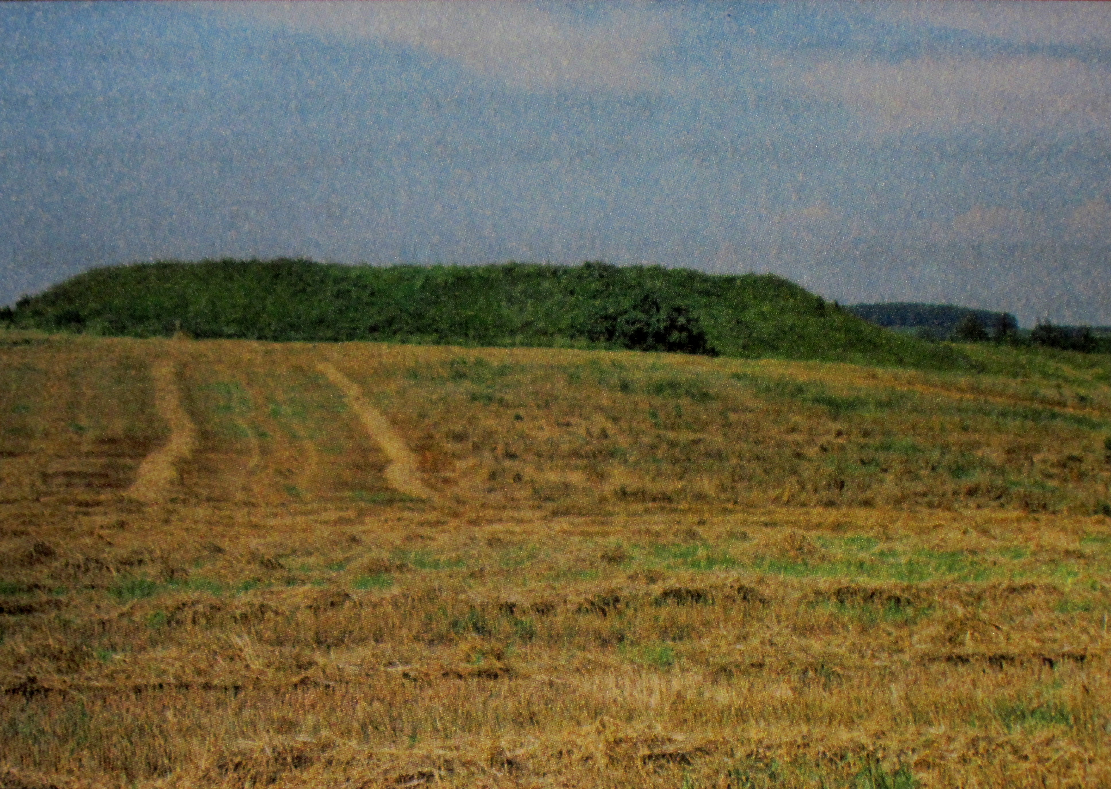 Гарадзішча Нясвіжскага замку